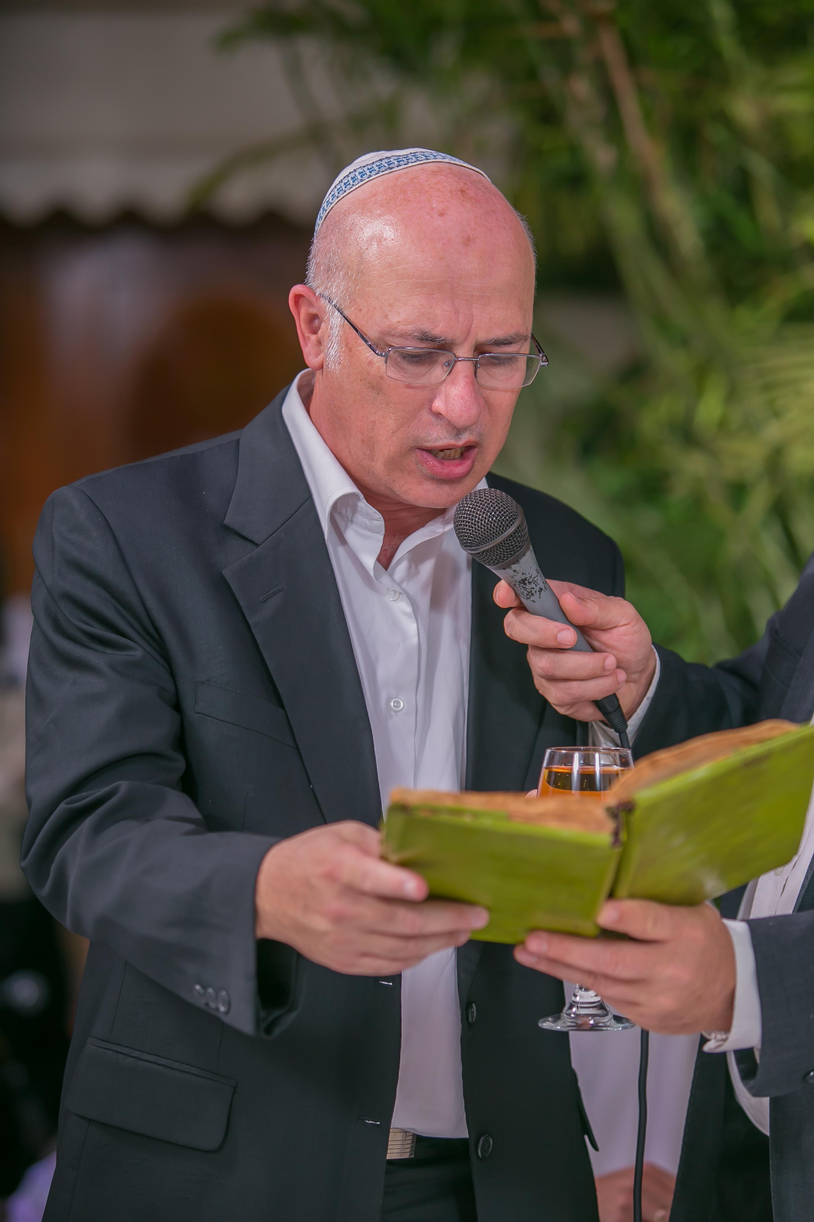 הרב ד"ר הראל גורדין